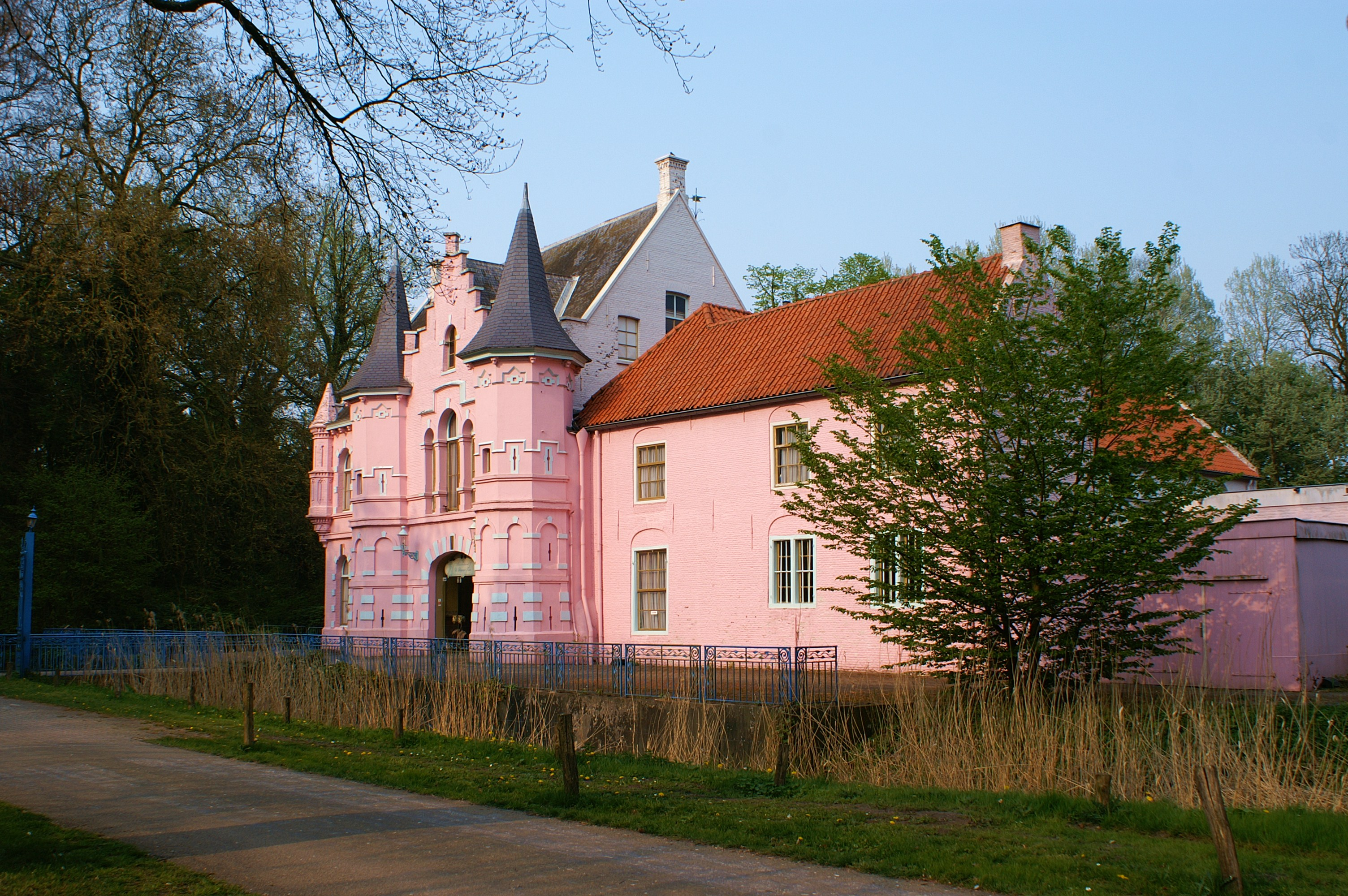 Het poortgebouw van het verdwenen huis te Drunen of kasteel d'Oultremont te Nieuwkuijk.